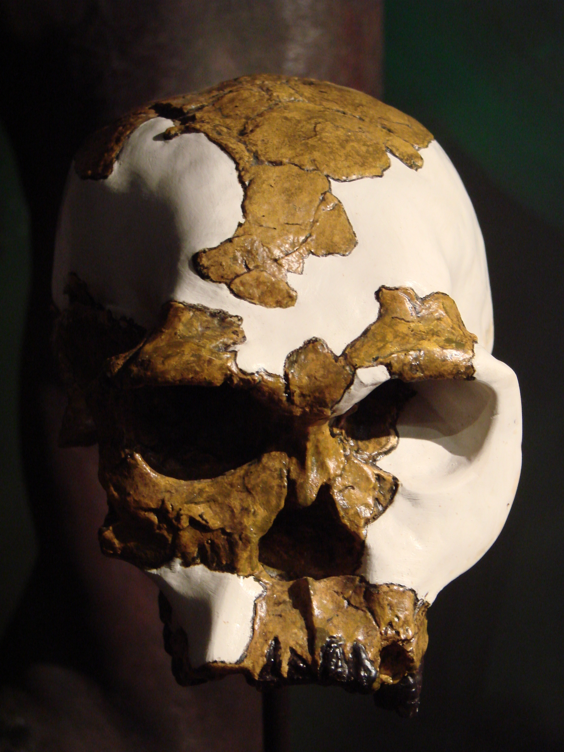 Muséum d'Anthropologie, campus universitaire d'Irchel, Université de Zurich (Suisse) : Homo habilis